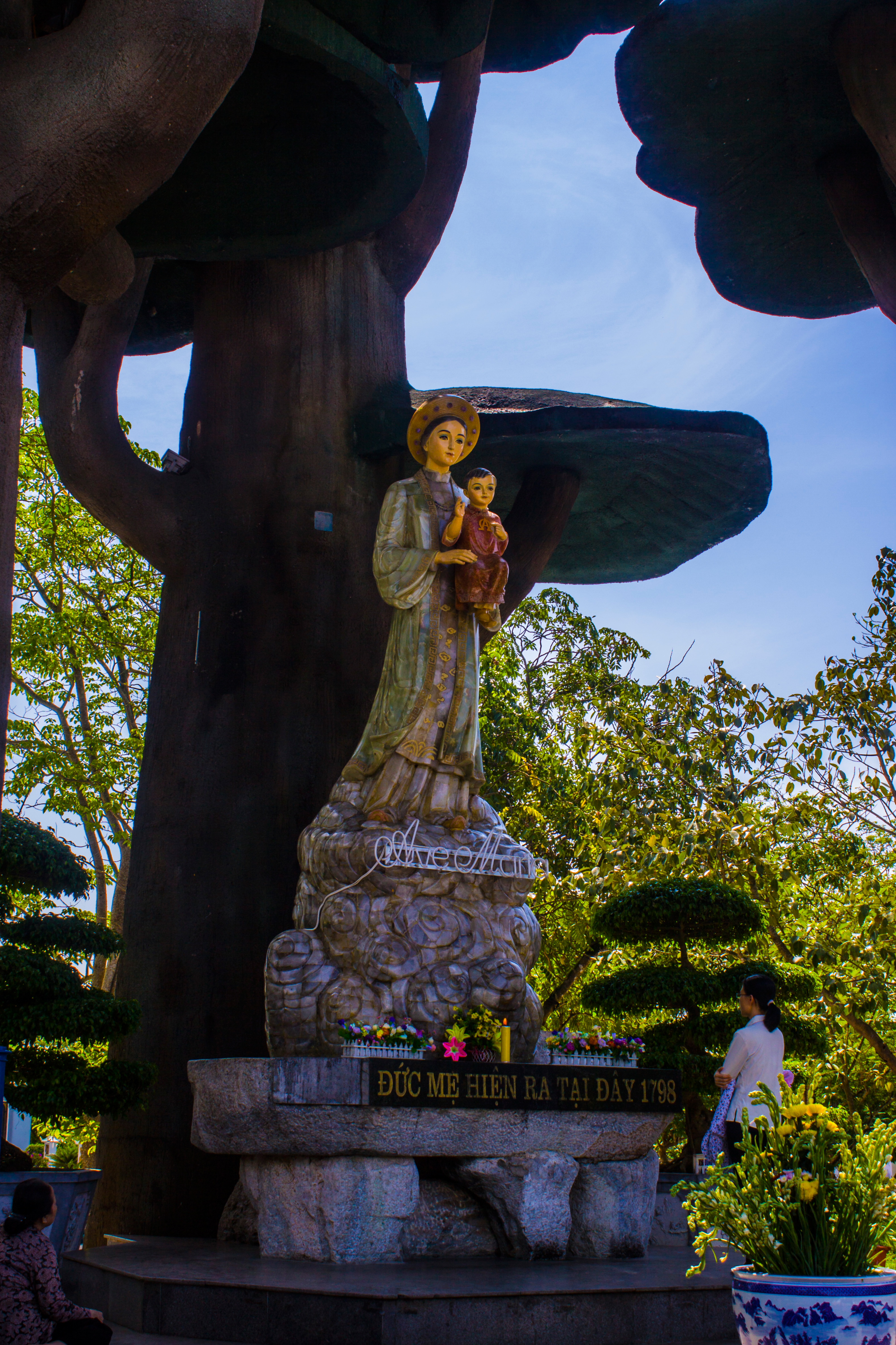 Tượng Đức Mẹ nơi Người hiện ra